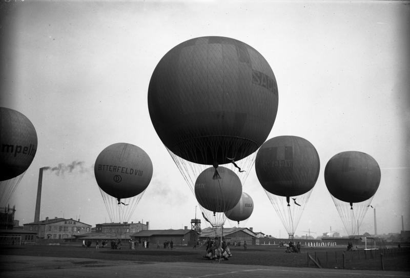 Das grosse Frühlings-Ballon-Anfliegen in Bitterfeld, als Auftakt für das kommende Gordon-Bennett-Wettfliegen in Los Angeles/Ameriga. Die startbereiten Ballons vor ihrem Abflug.